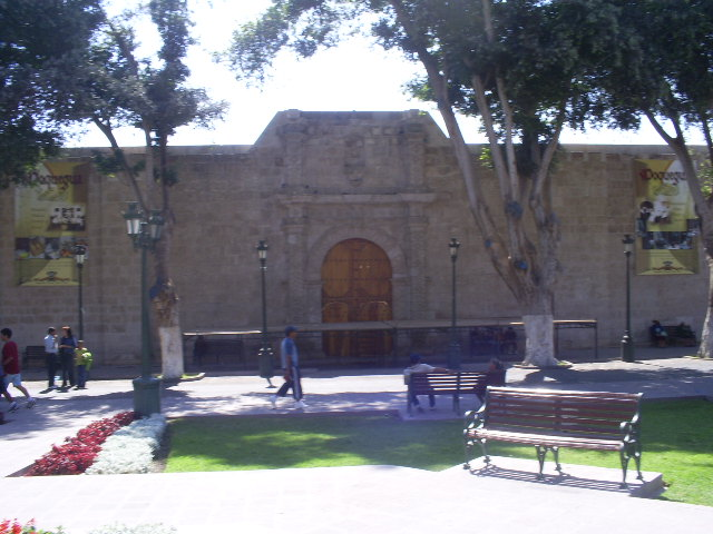 Antigua Iglesia Matriz en la ciudad de Moquegua